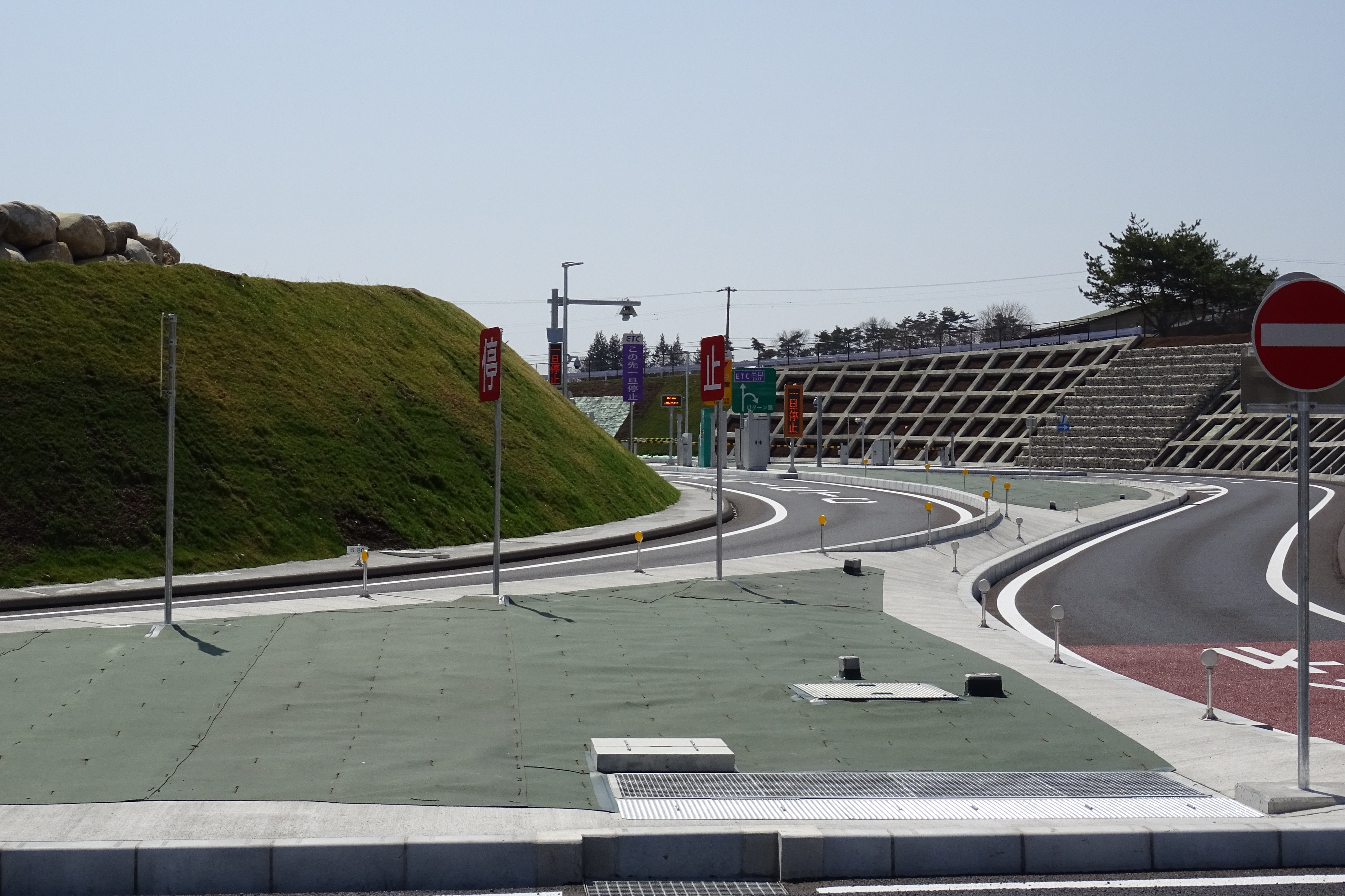 駒ヶ岳サービスエリア上り